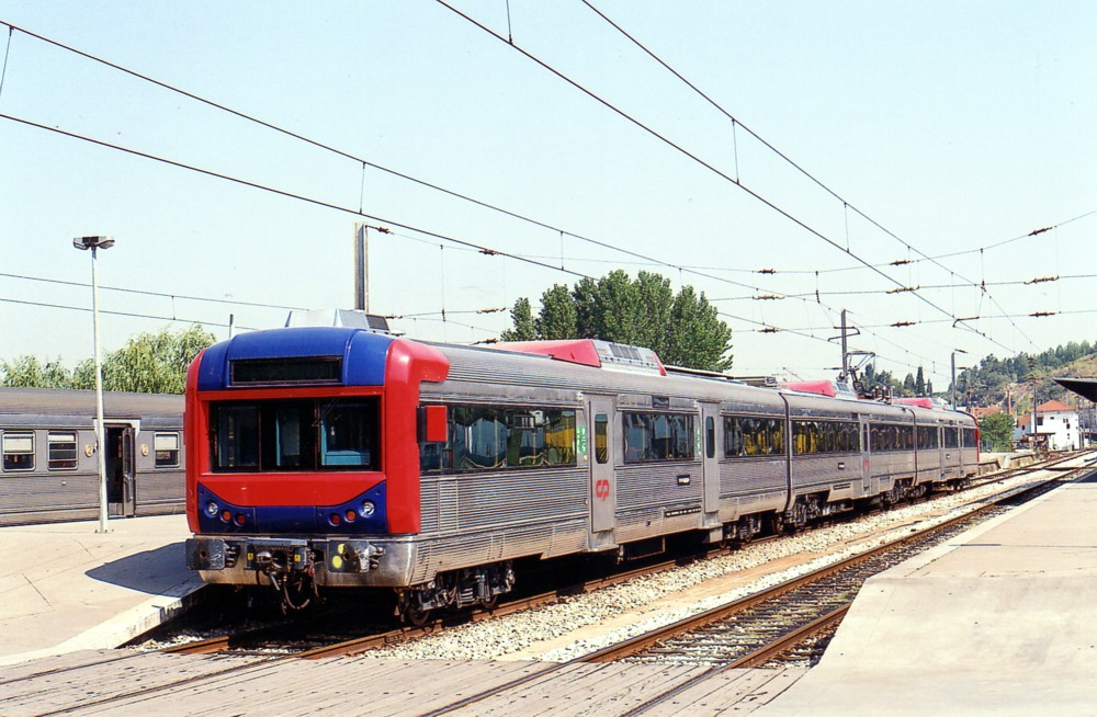 2243 en Coïmbra-B.